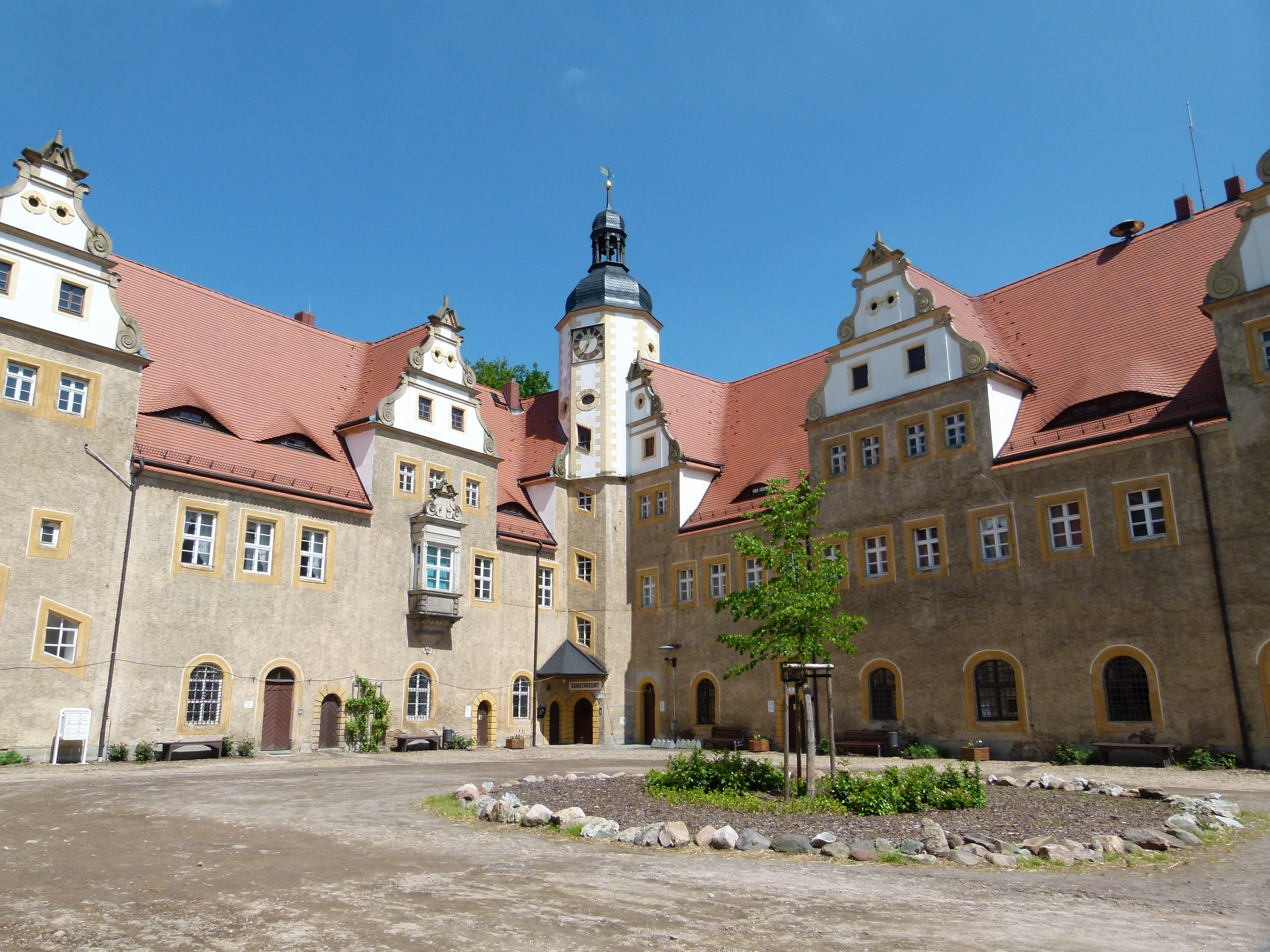 Altes Jagdschloss Wermsdorf, Sachsen